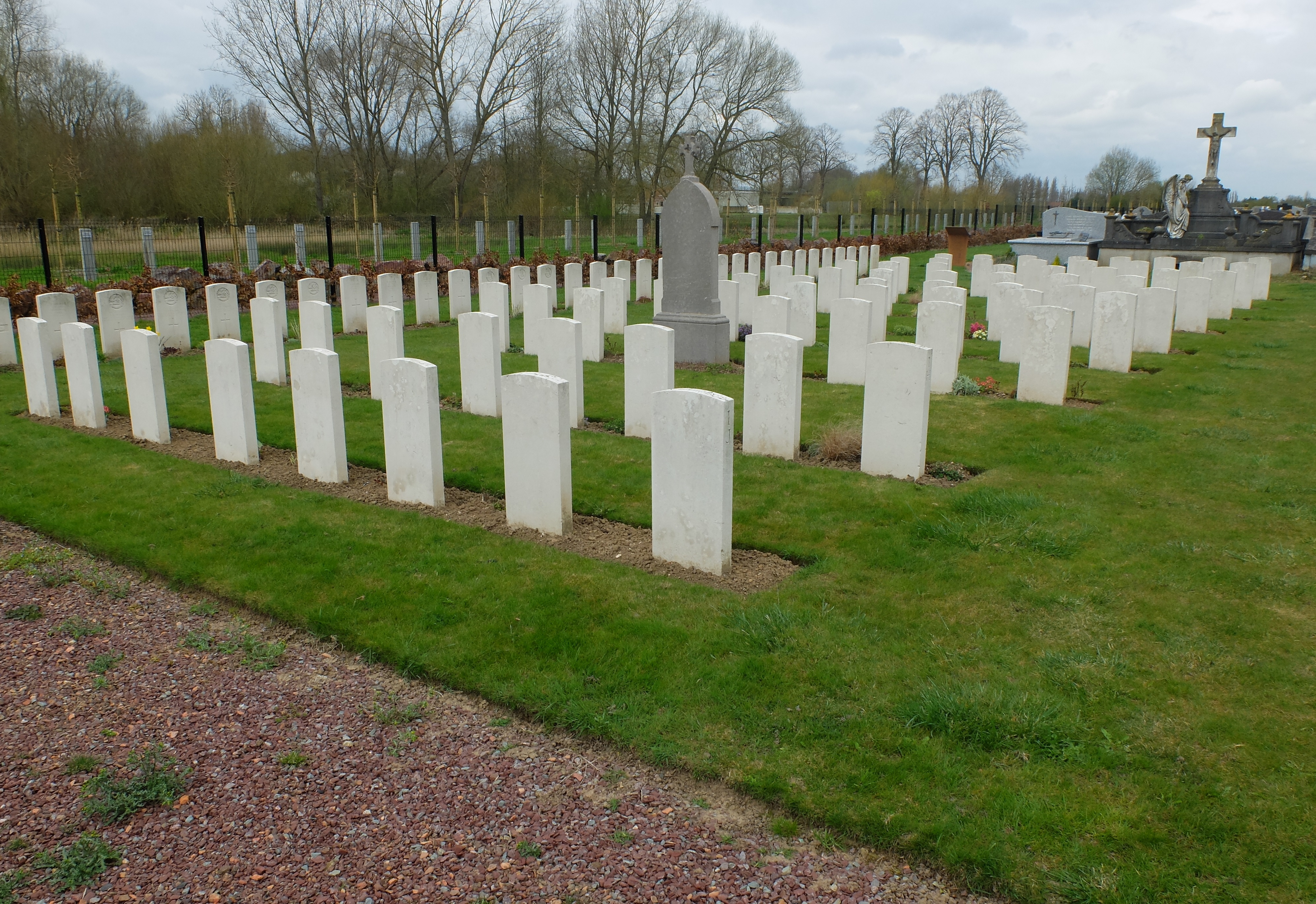 Vue du St.Venant Communal Cemetery, du côté des tombes hindoues.